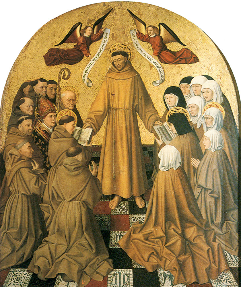 Saint Francis of Assisi Gave the Canon to Franciscan Orderslabel QS:Len,"Saint Francis of Assisi Gave the Canon to Franciscan Orders"label QS:Lit,"San Francesco consegna la regola al primo ordine francescano (Sant'Antonio) e al secondo ordine francescano (Santa Chiara)"